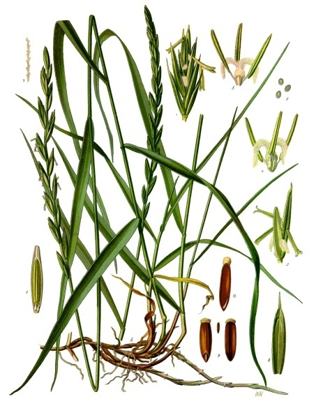 Gewöhnliche Quecke. A - Pflanze der Var. vulgare in natürl. Grösse; 1 Ährchen, vergrössert; 2 innere Spelze mit Blütenteilen, desgl.; 3 einzelnes Blütchen mit den Deckspelzen, desgl.; 4, 5 Blüten ohne Spelzen, von verschiedenen Seiten, desgl.; 6 Pollen, desgl.; 7 Ast aus dem federigen Teil der Narbe, desgl.; 8 innere und äussere Spelze, desgl.; 9 Same von verschiedenen Seiten, natürl. Grösse und vergrössert; 10 derselbe im Längsschnitt, desgl.